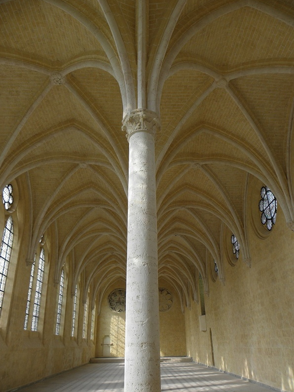 Intérieur du réfectoire de l'abbaye Saint-Jean-des-Vignes de Soissons (02).